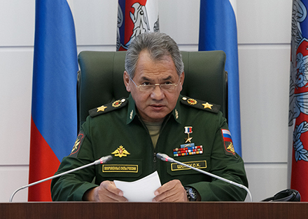 Совещании министра обороны РФ С. Шойгу с руководящим составом МО РФ в Национальном центре управления обороной РФ.